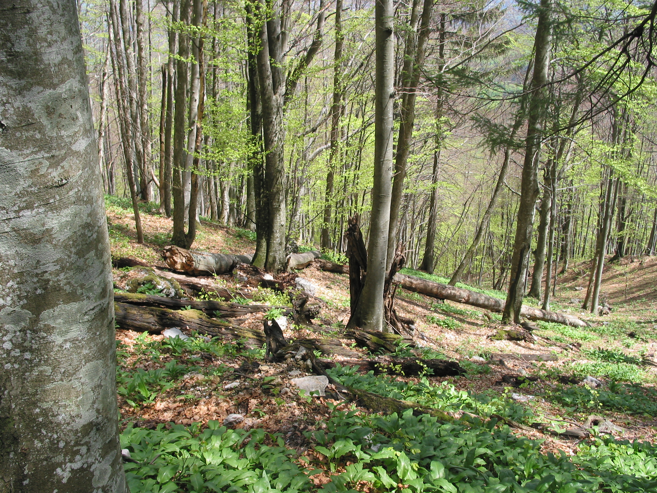 Pragozd Krokar nad Kolpo